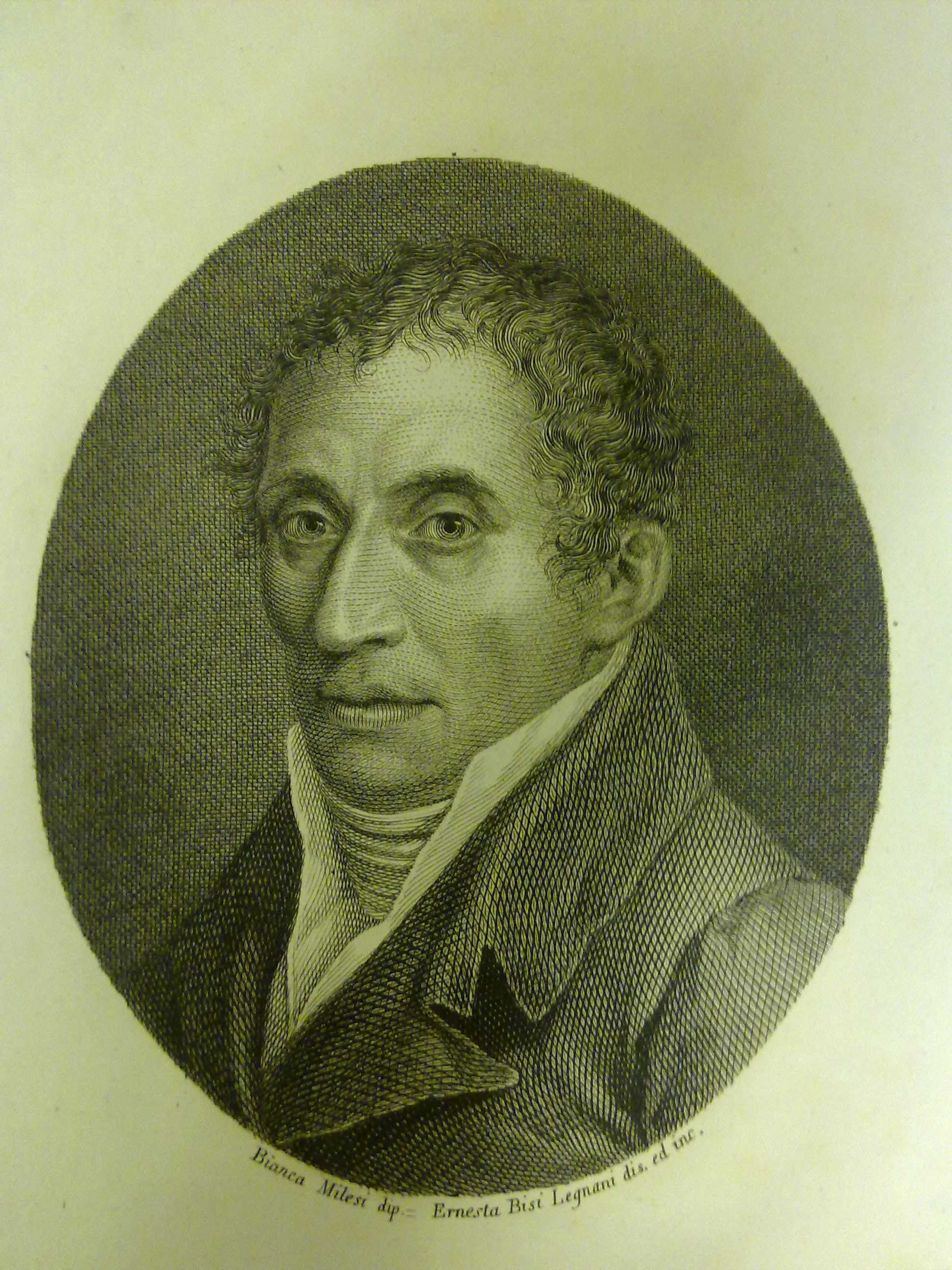 Ritratto di Giambattista Monteggia